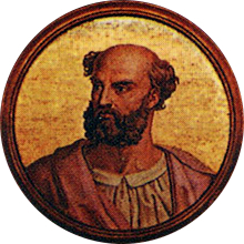 Pope Damasus II.